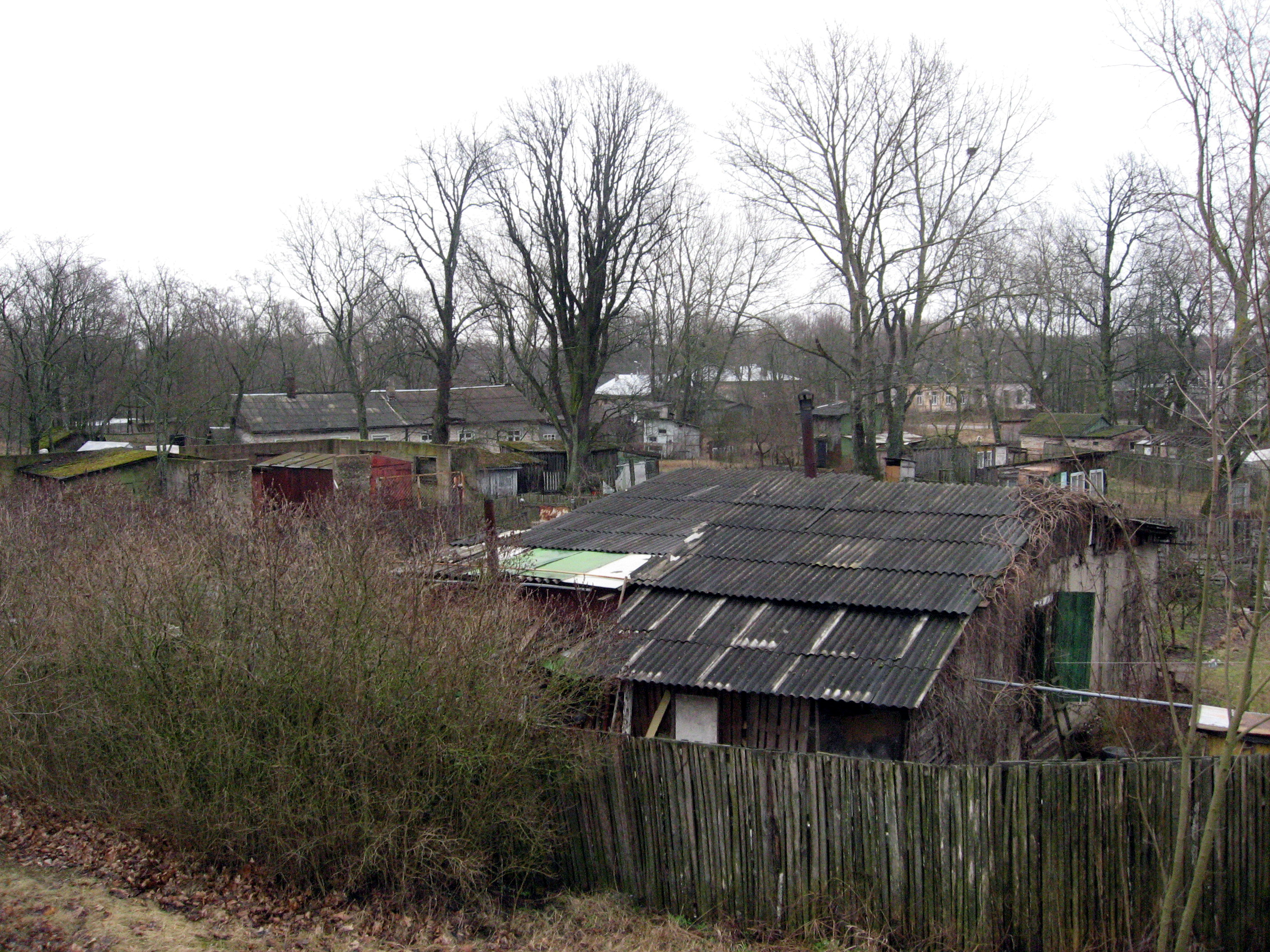 Mangaļu pussala